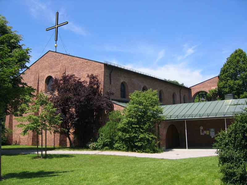 St. Laurentius in Munich-Gern, Bavaria